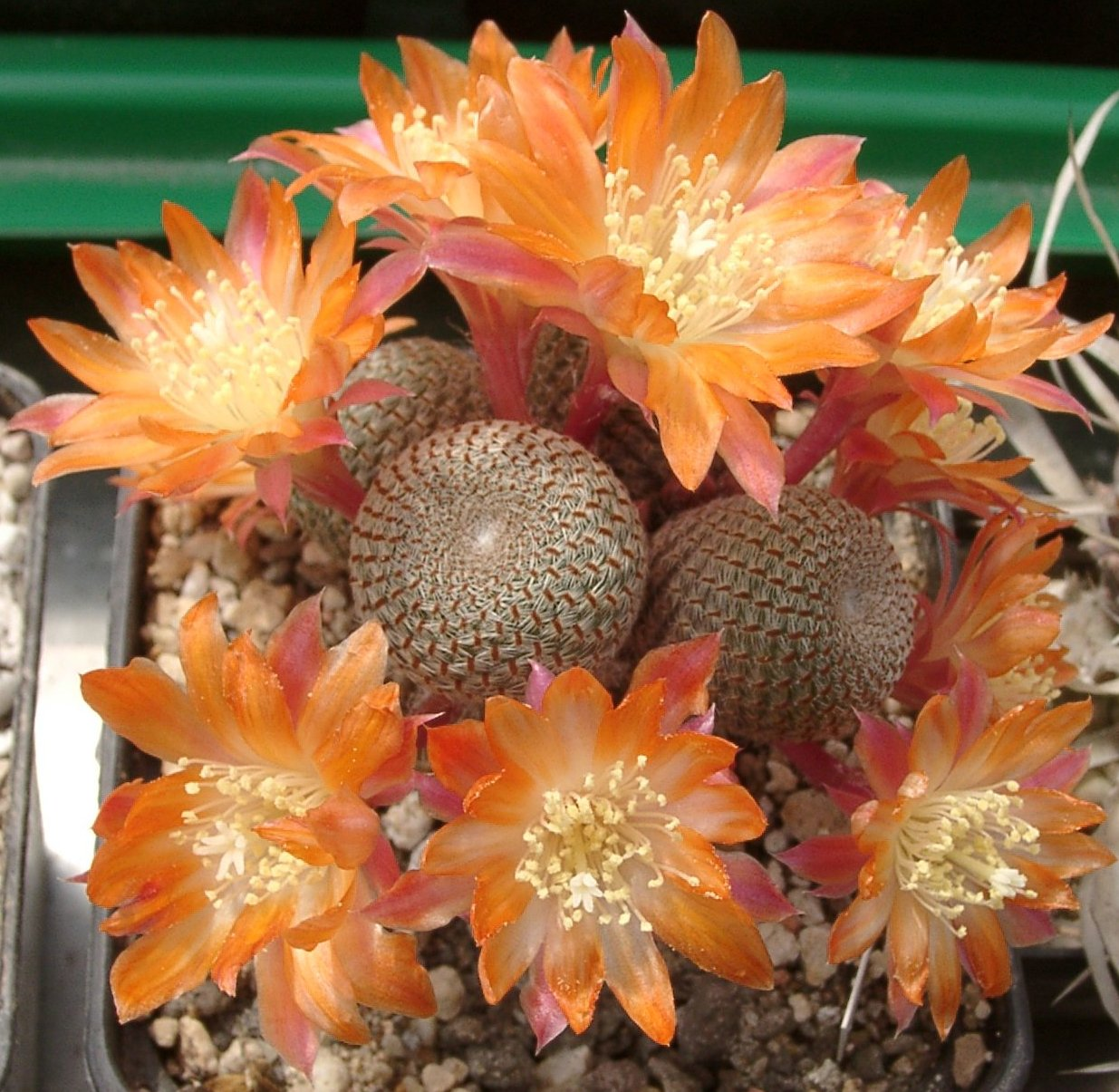 Rebutia heliosa in Blüte